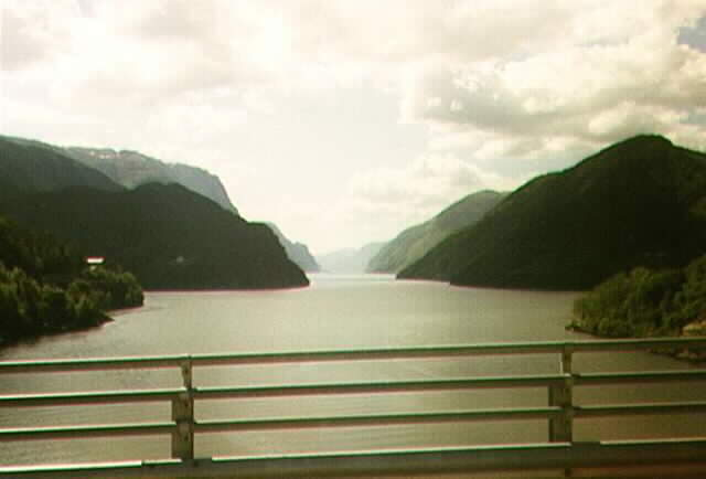 Old bridge to Osterøy: Kallestadsundet bridge, wiev Veafjorden Norway. Photo: Svein Harkestad, Bergen in Norway